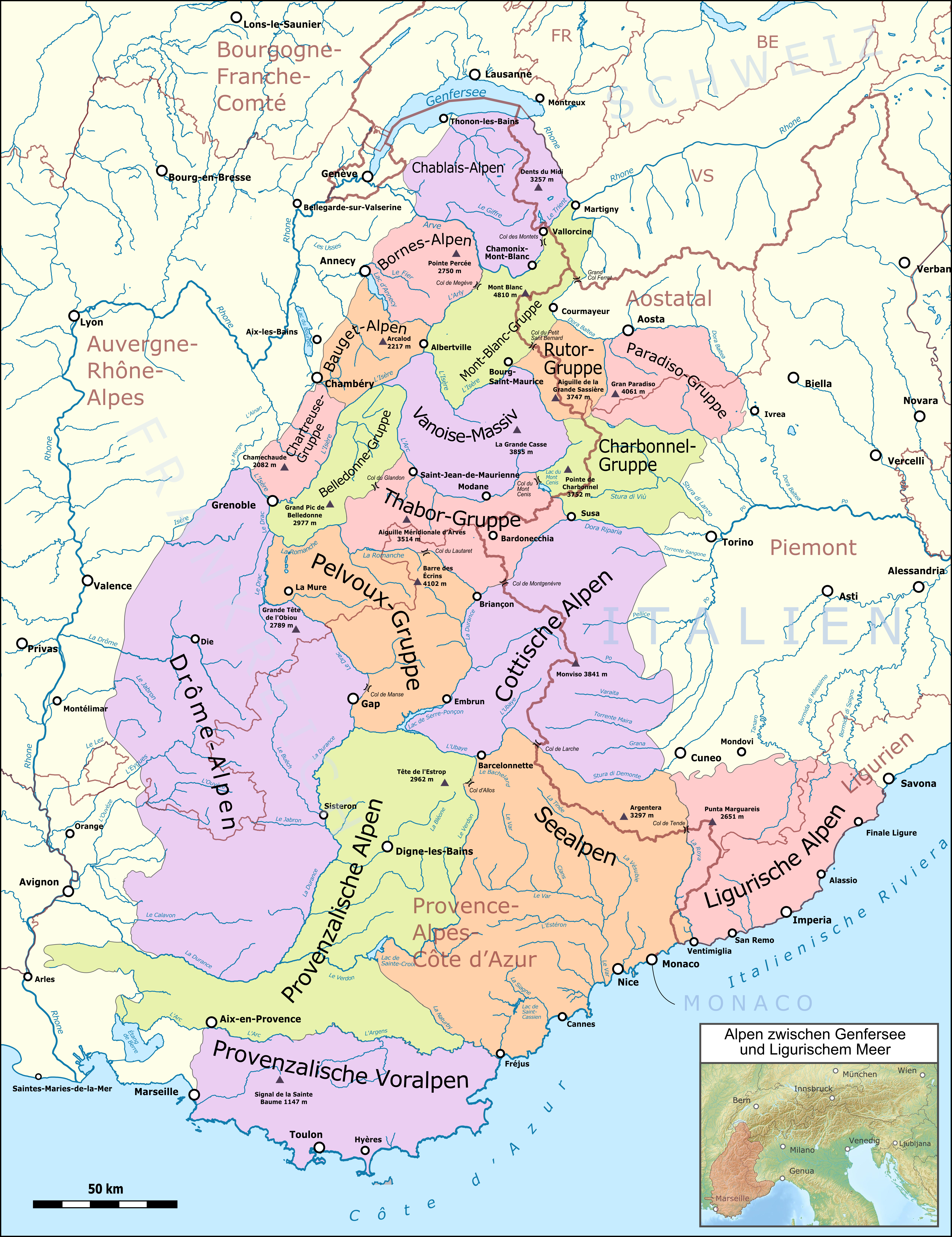 Lagekarte der westlichen Westalpen